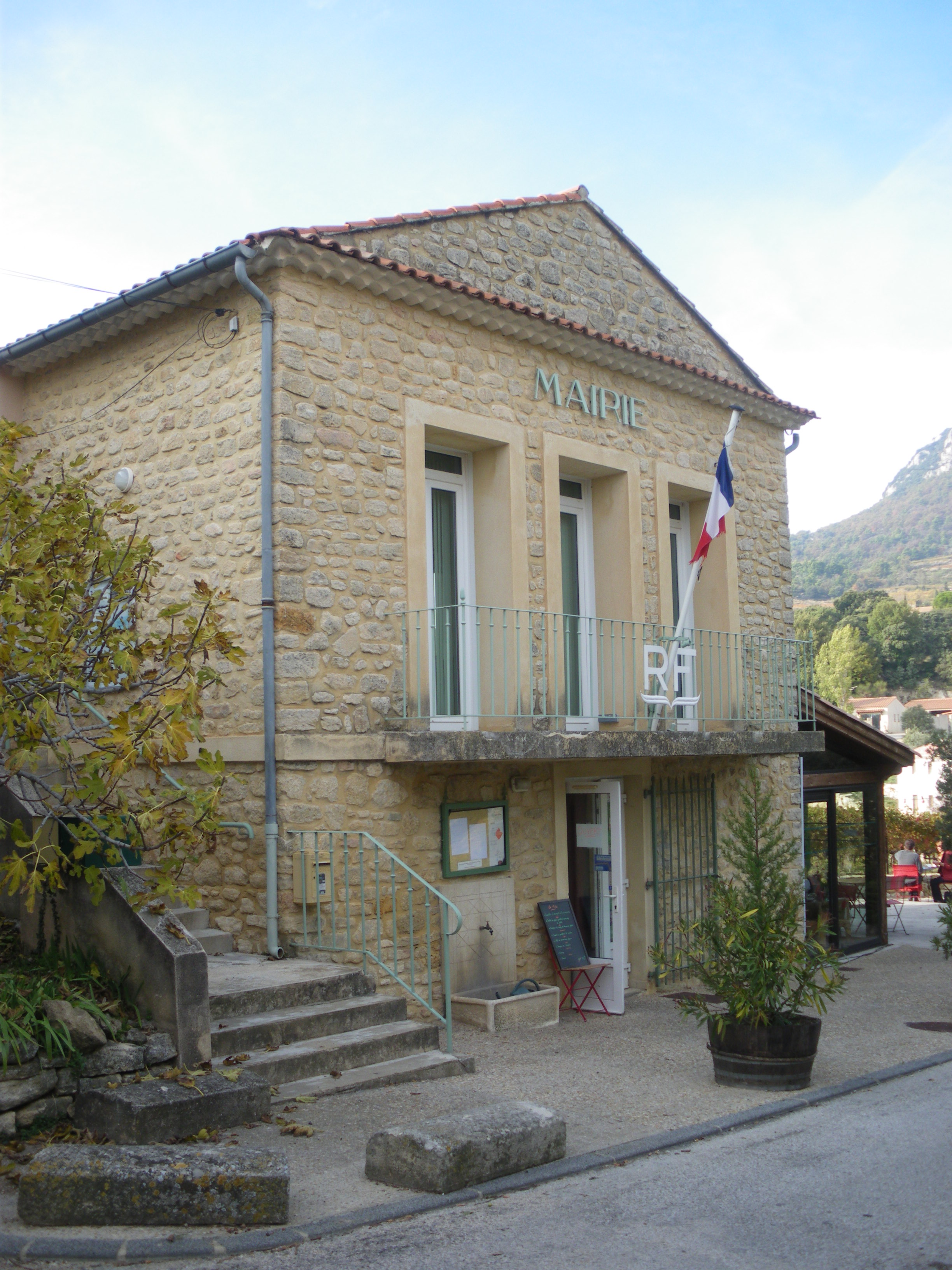 Mairie de Suzette, Vaucluse, France